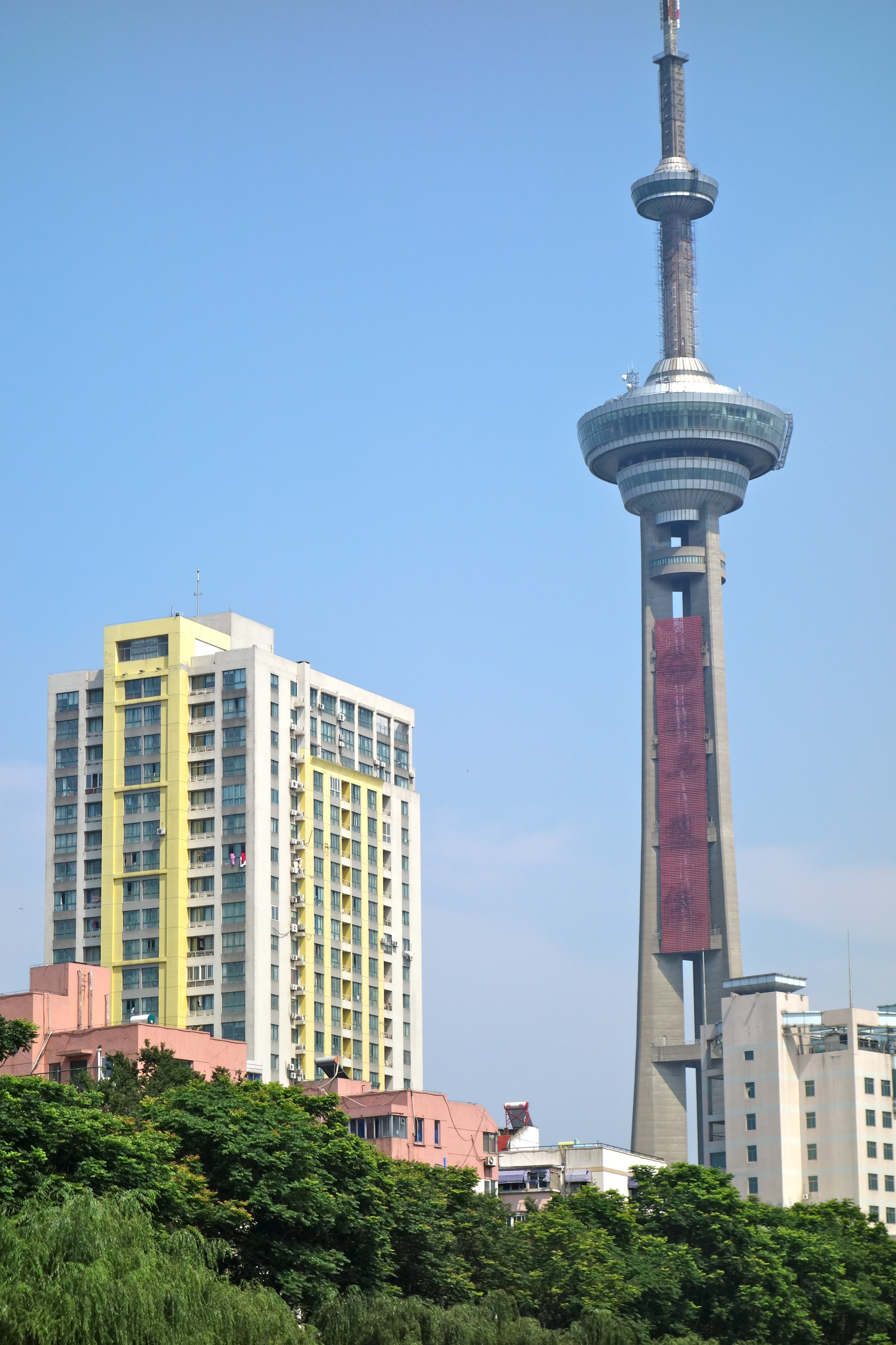 江苏电视塔